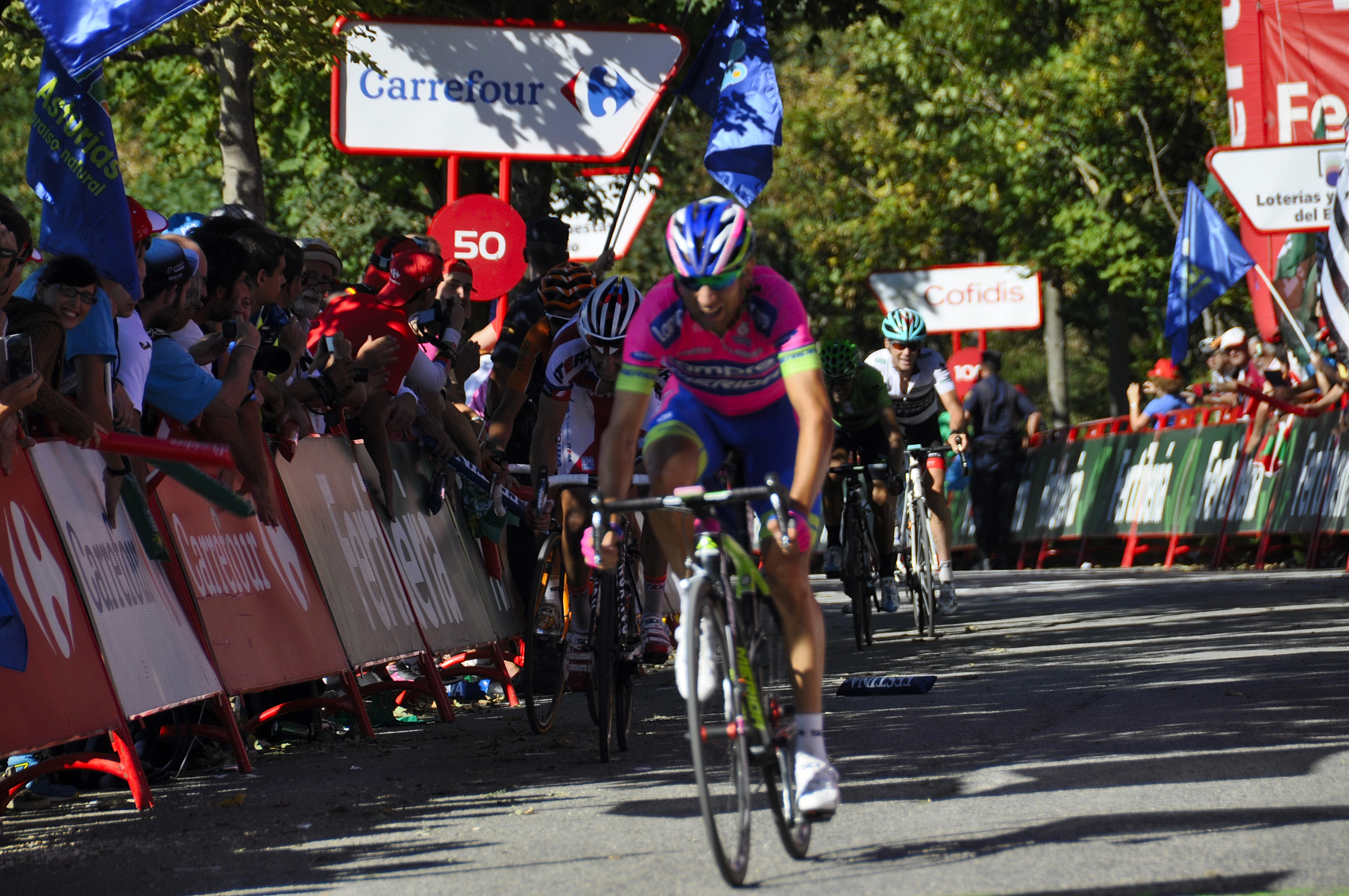 Sprint por el 2º puesto en el Naranco entre Diego Ulissi (Lampre), Daniel Moreno (Katusha) y Samuel Sánchez (Euskaltel) y al fondo Alejandro Valverde (Movistar) y Chris Horner (Radioshack)